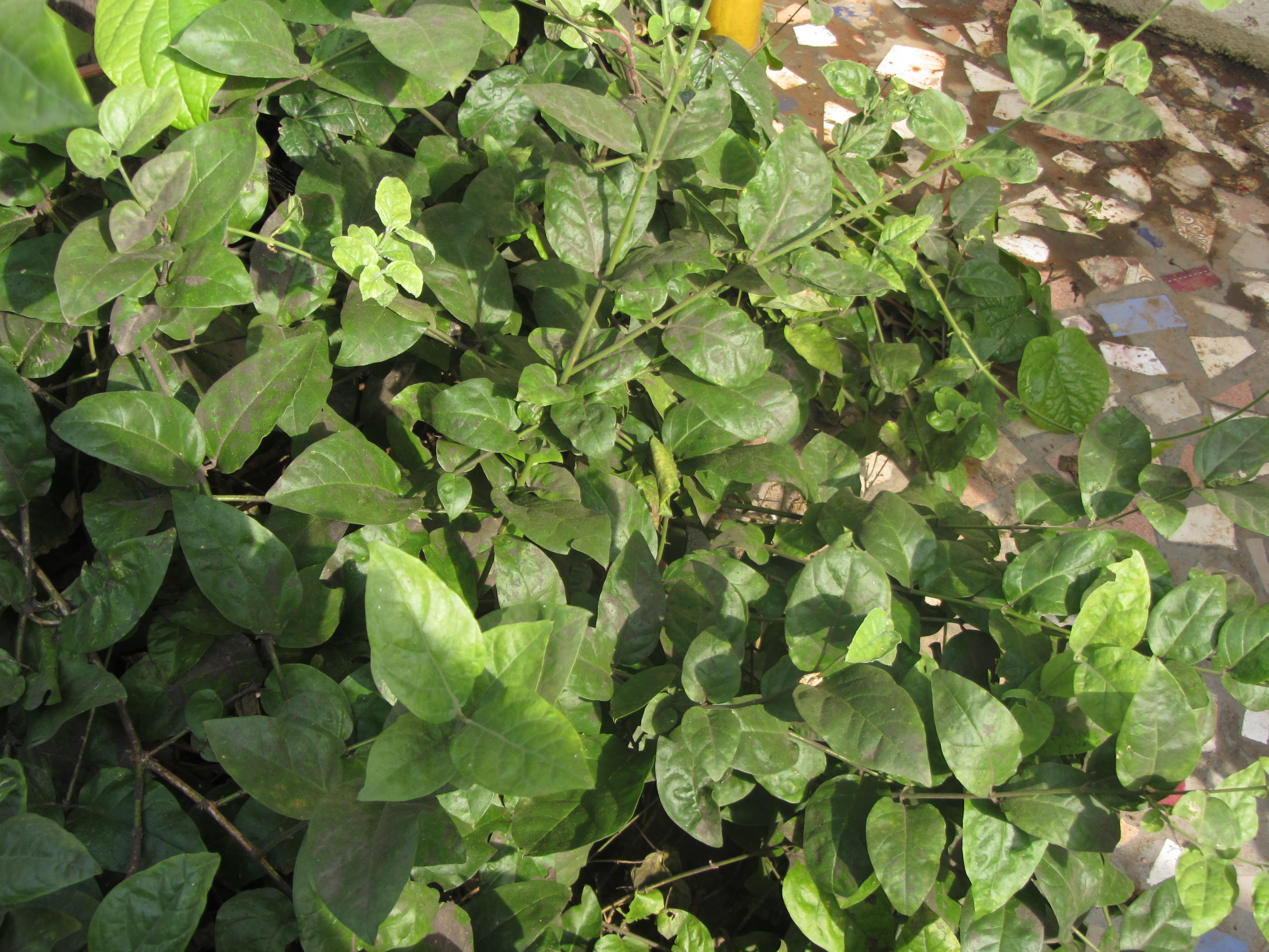 own shot அடுக்குமல்லிப்பூ பூக்கும் செடி.நள்ளிருள்-நாறி